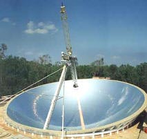 sperical solar reflector